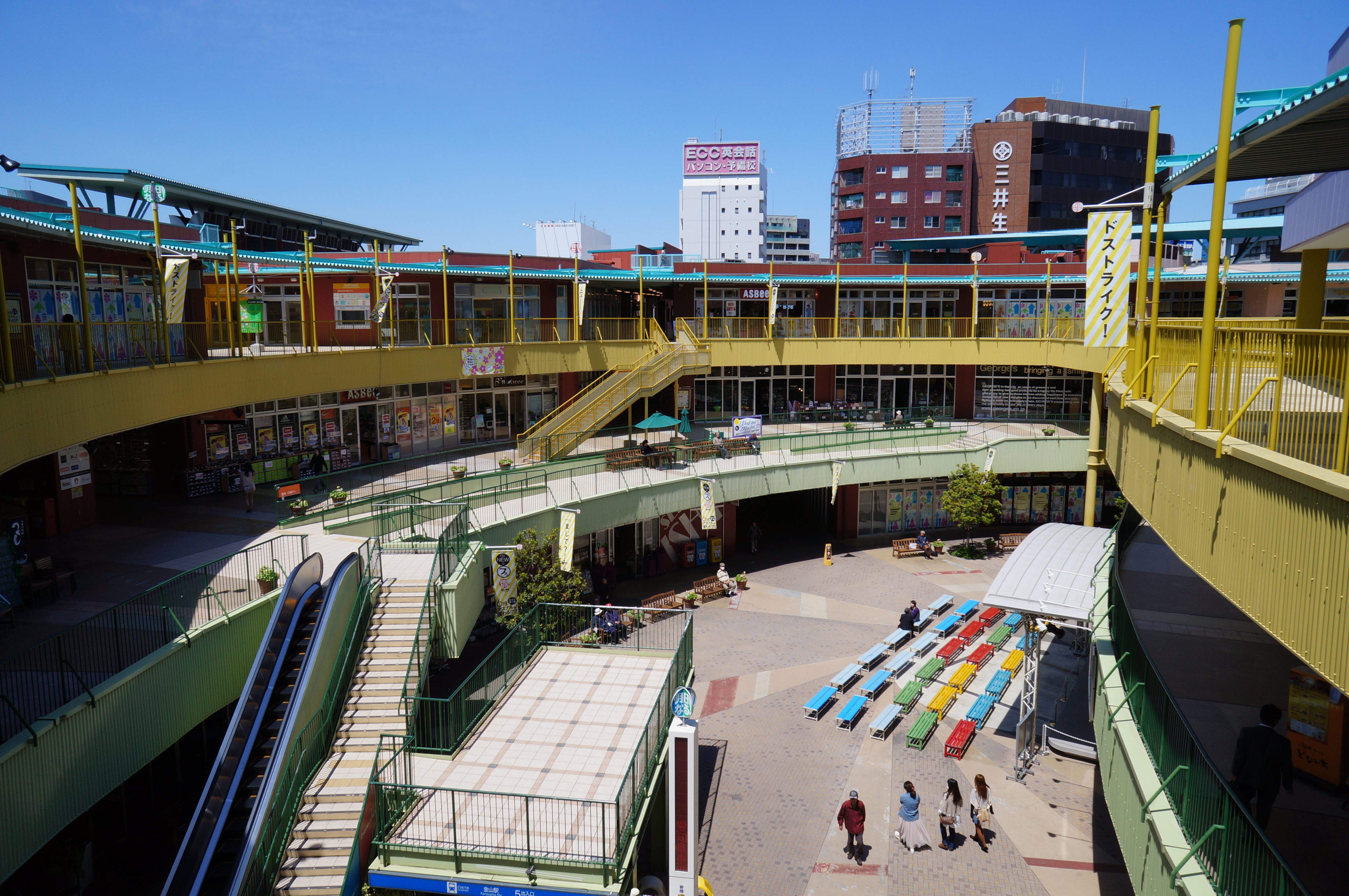 名古屋・金山の商業施設「アスナル金山」。3階から全体を望む。